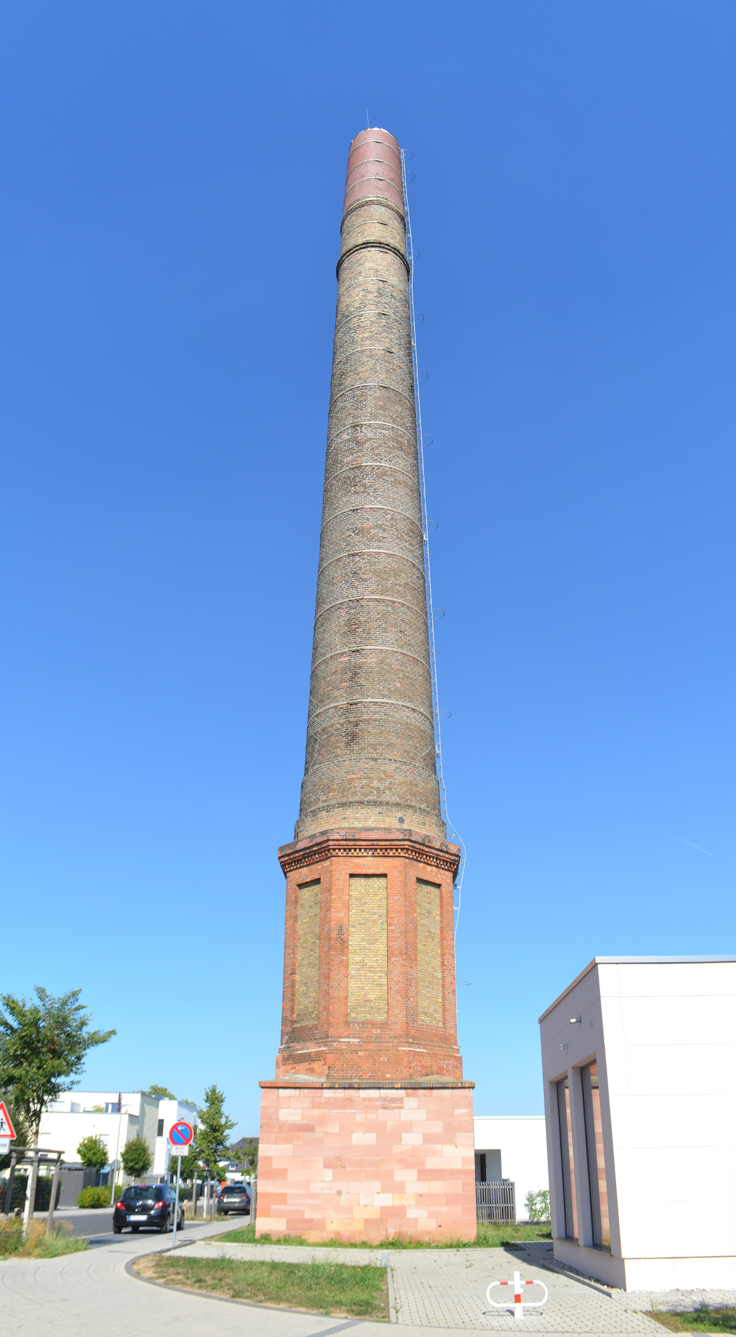 Hattersheim, Ehemalige Sarotti-Schokoladenfabrik, Schornstein